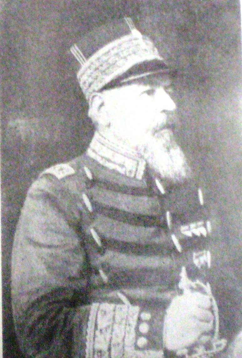 Rufino Ortega